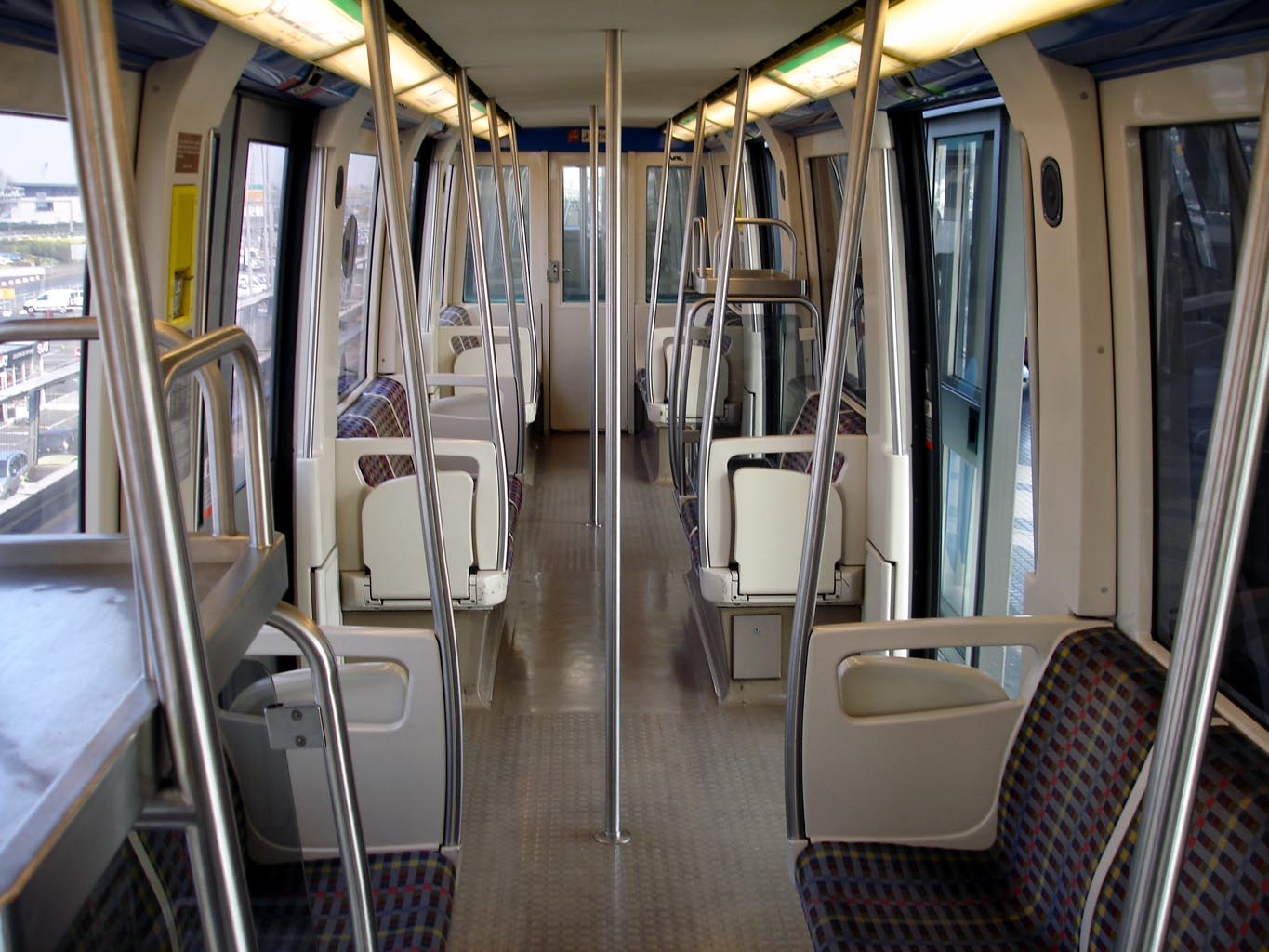 Interieur d'une rame VAL 206 d'Orlyval